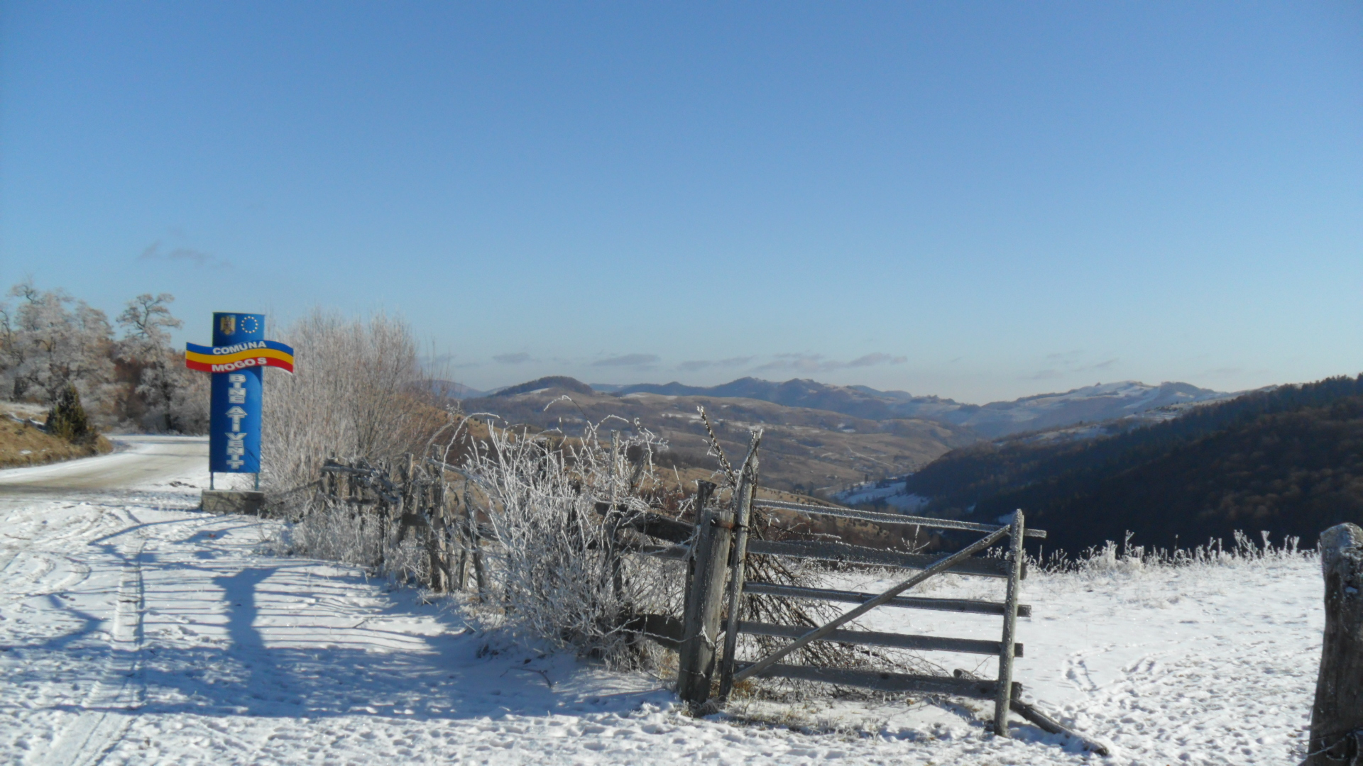 Vedere de pe Dealul Mogoșului